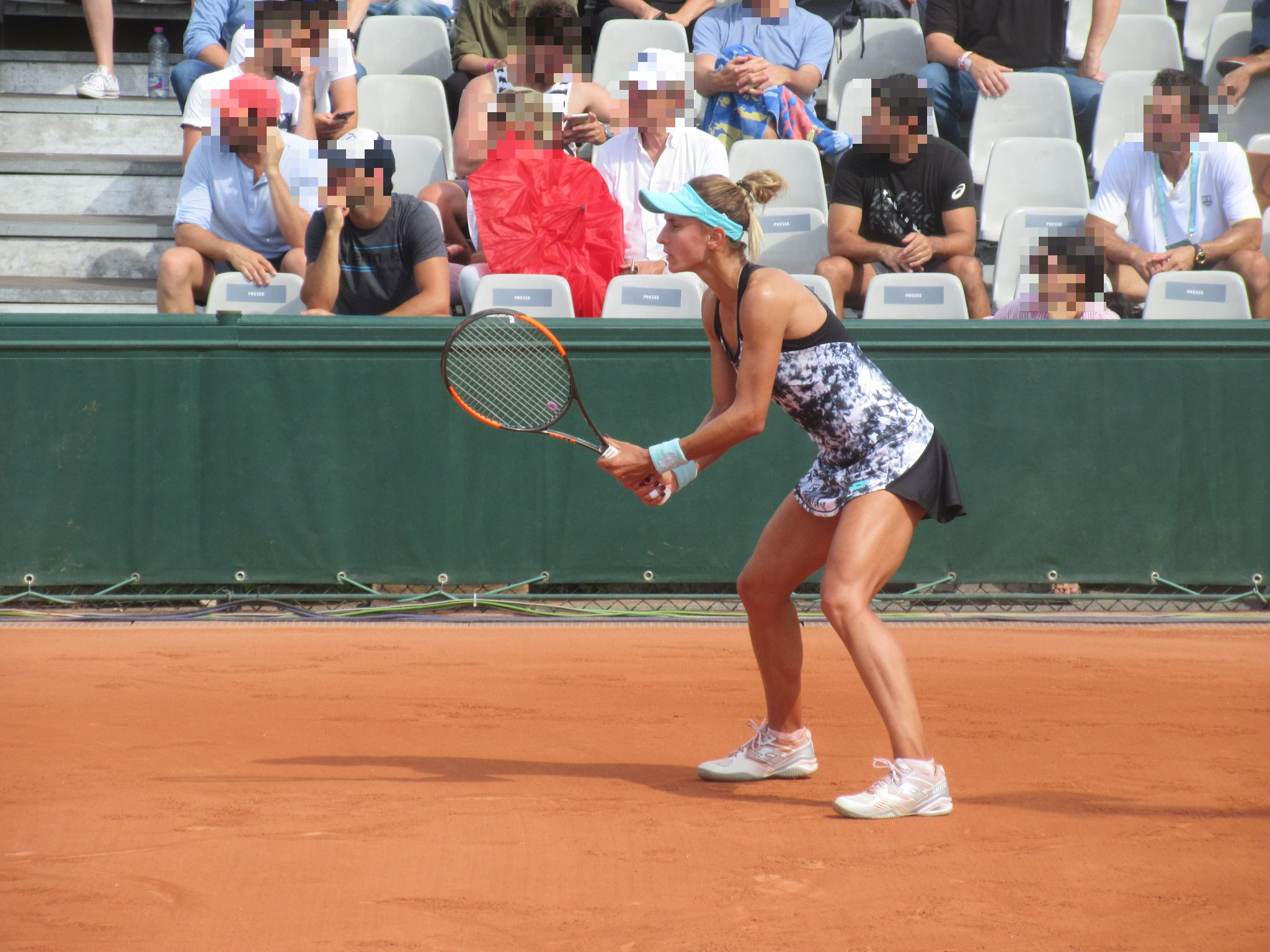 Lesia Tsurenko à Roland-Garros en 2018